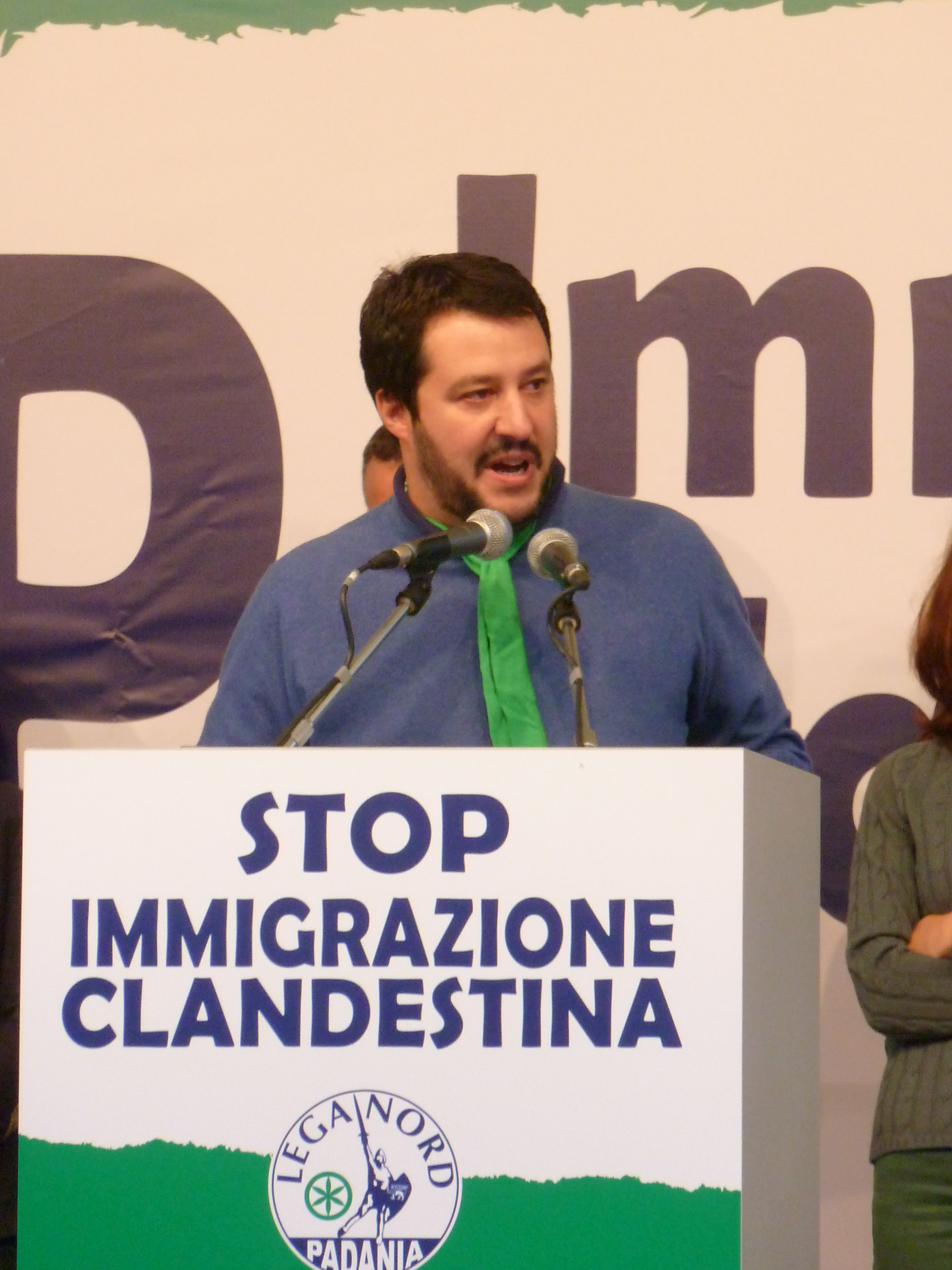 Manifestazione Lega Nord a Torino contro l'immigrazione clandestina.